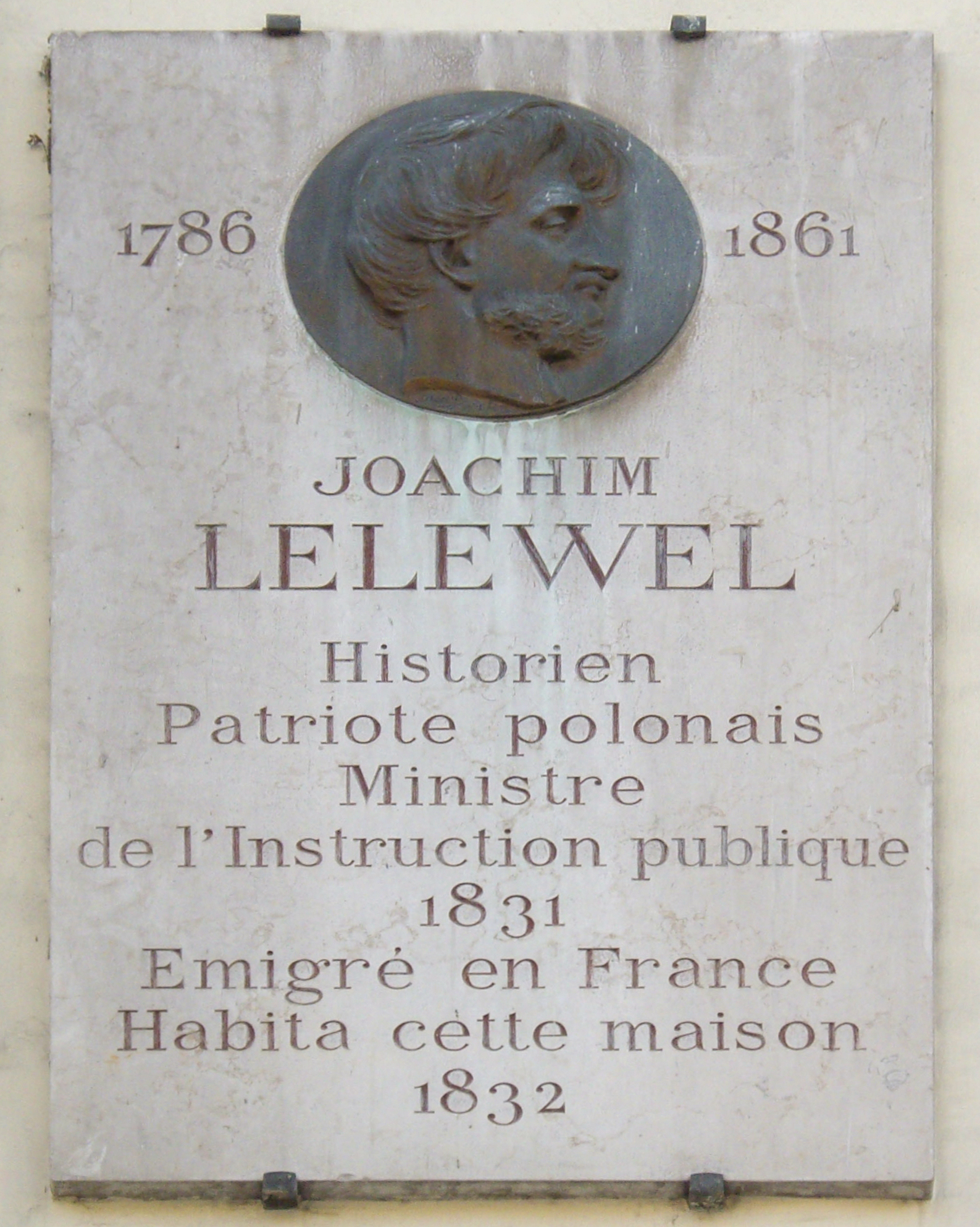 Plaque apposée au n° 153 du boulevard Saint-Germain, Paris 6e. « 1786-1861. Joachim Lelewel, historien, patriote polonais, ministre de l'Instruction publique, 1831, émigré en France, habita cette maison, 1832. »